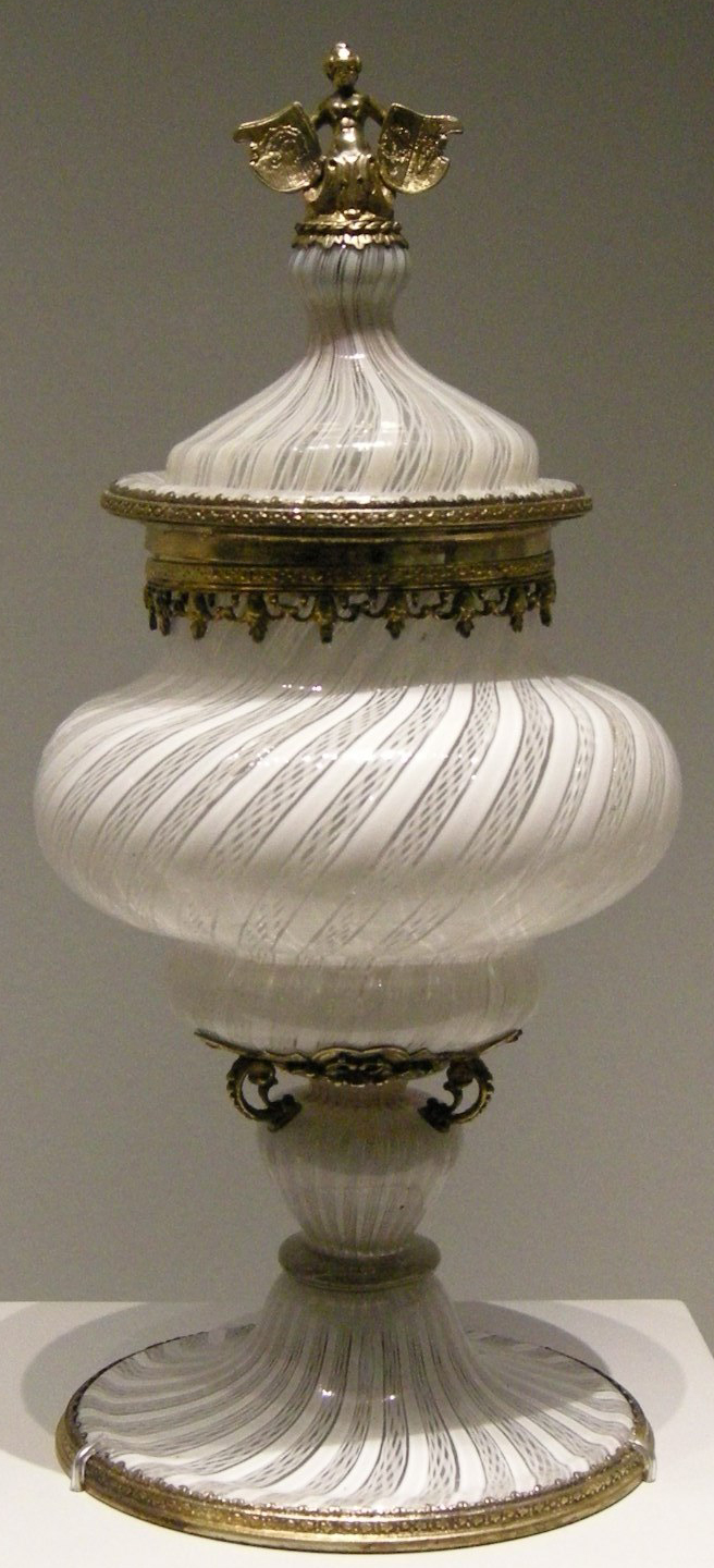 Façon de Venise, coppa coperta filigranata con stemmi, fine 1500-inizio 1600